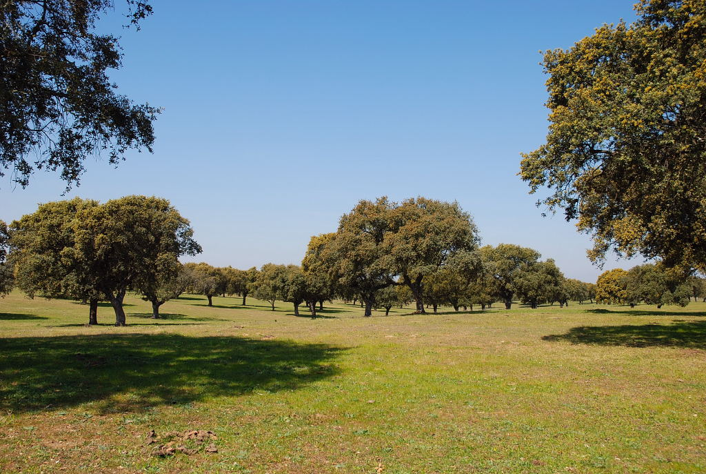 Dehesa la Anguila (Saucedilla, Cáceres)